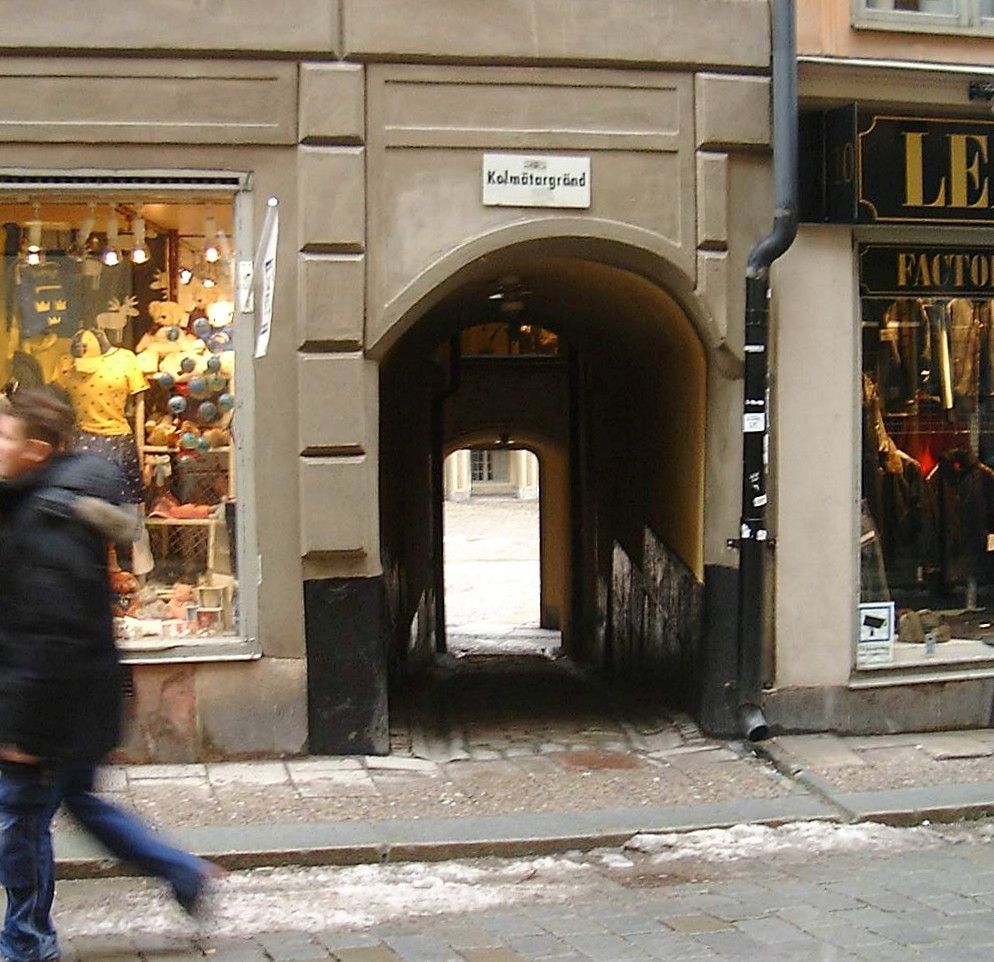 Kolmätargränd, Gamla stan, Stockholm